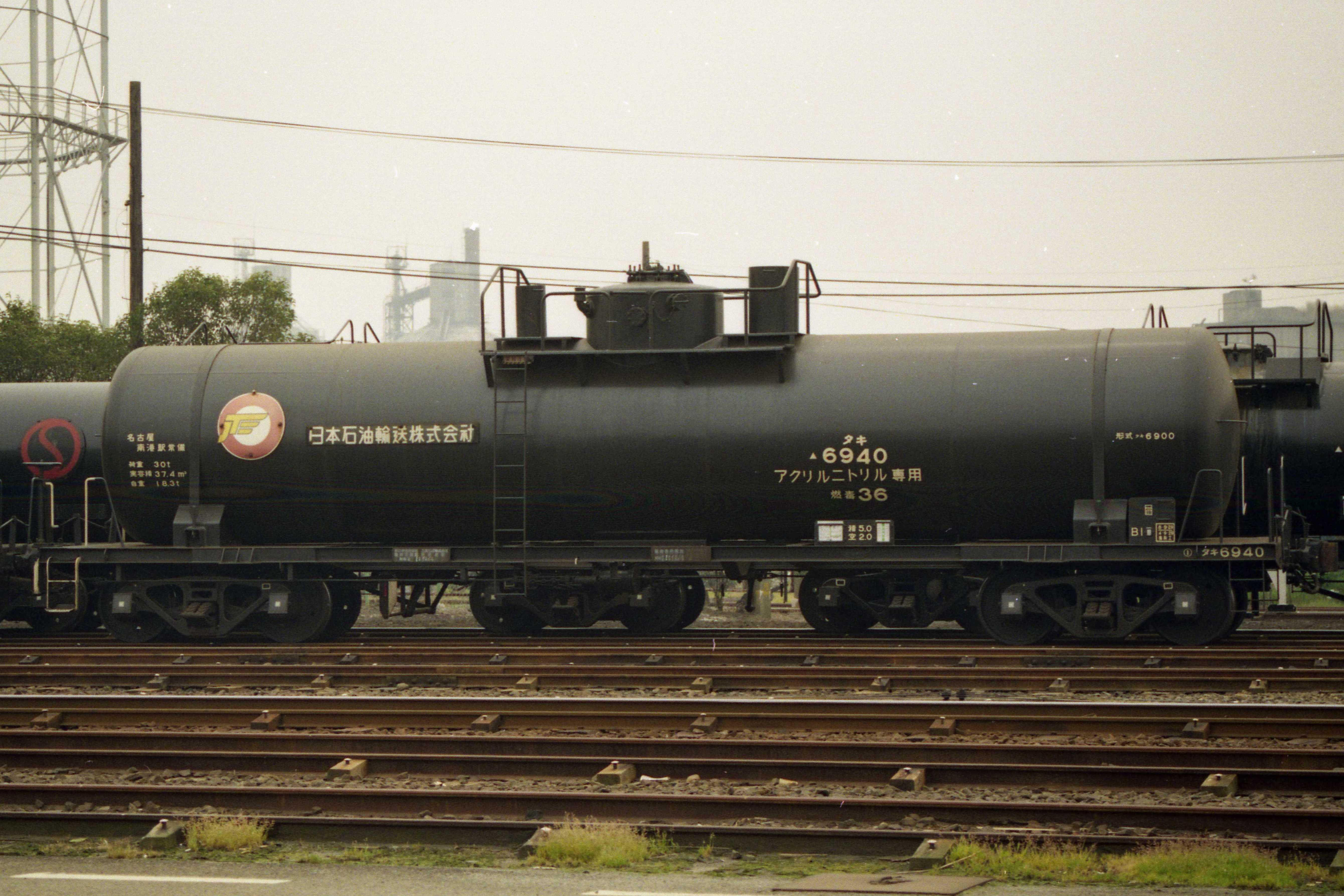 タキ6900形、タキ6940、1993年4月24日